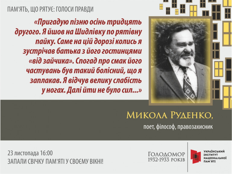 Микола Руденко